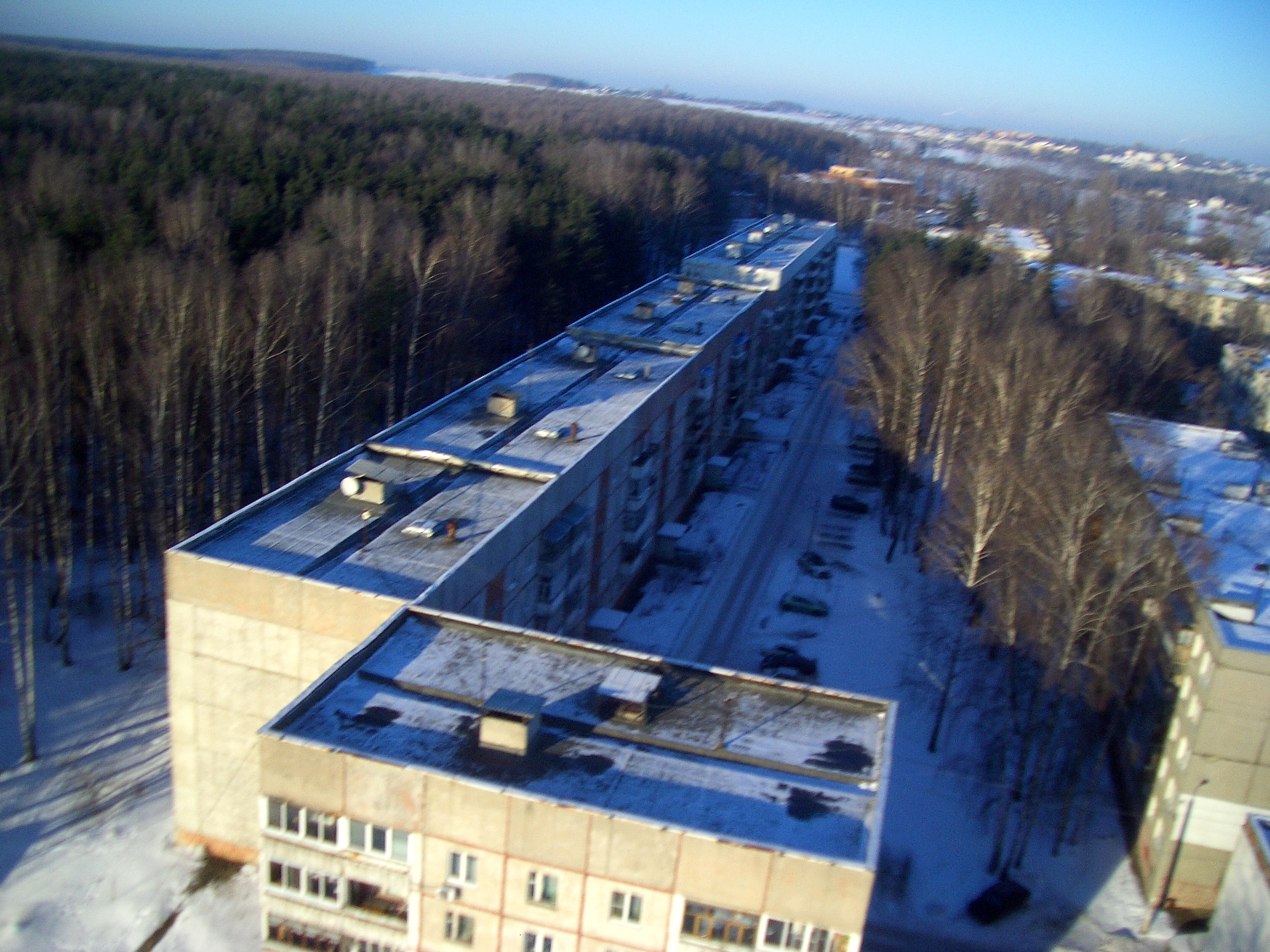 Ярославский район, поселок Лесная поляна, вид на пятиэтажные дома